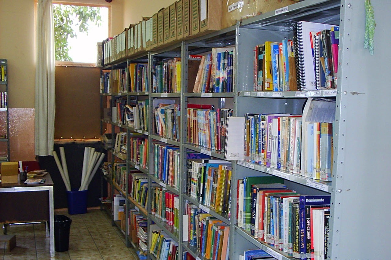 Biblioteca em 2004 - CEMEP - Paulínia/SP